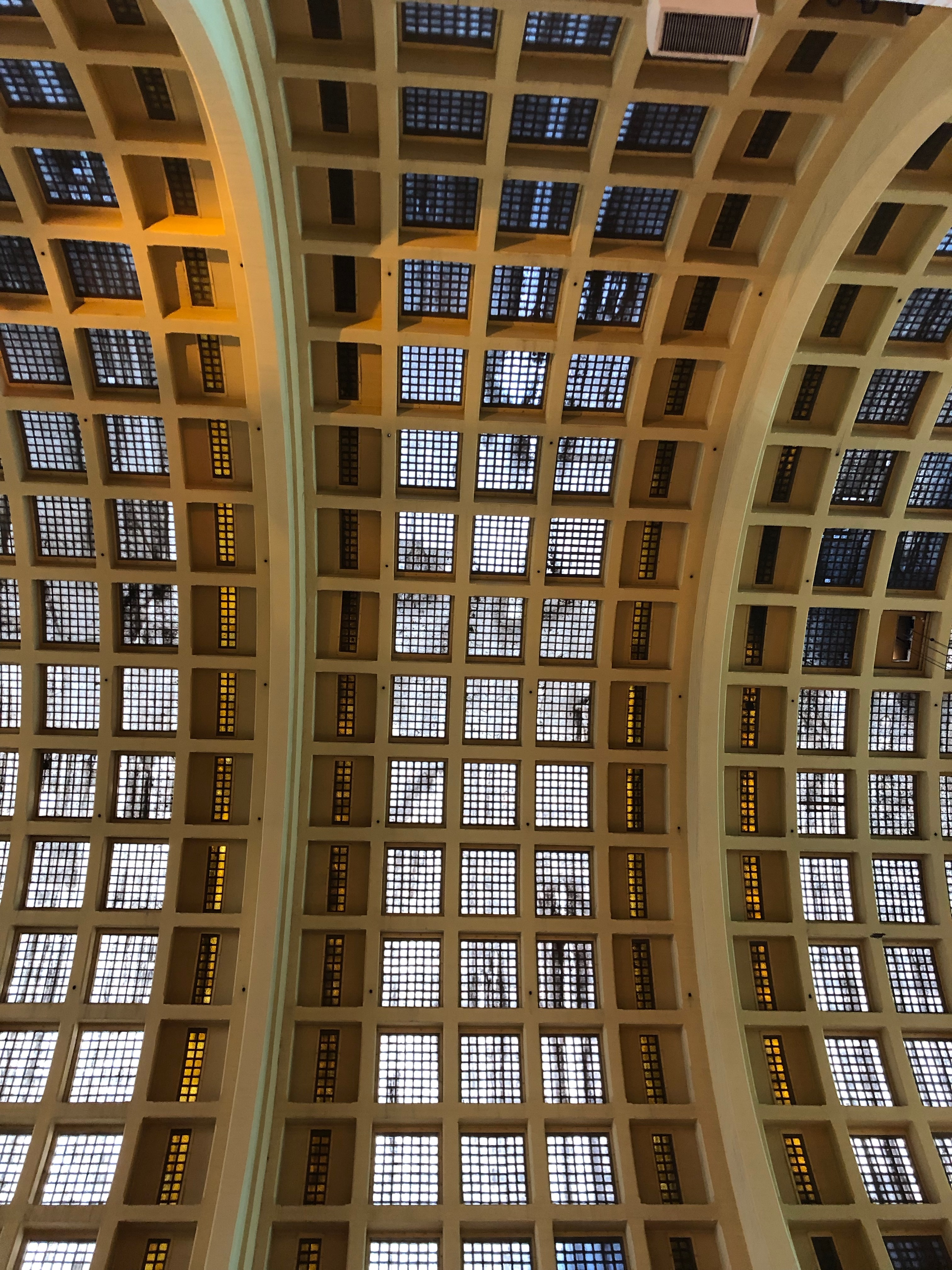 Techo de vidrio y hormigon del abasto